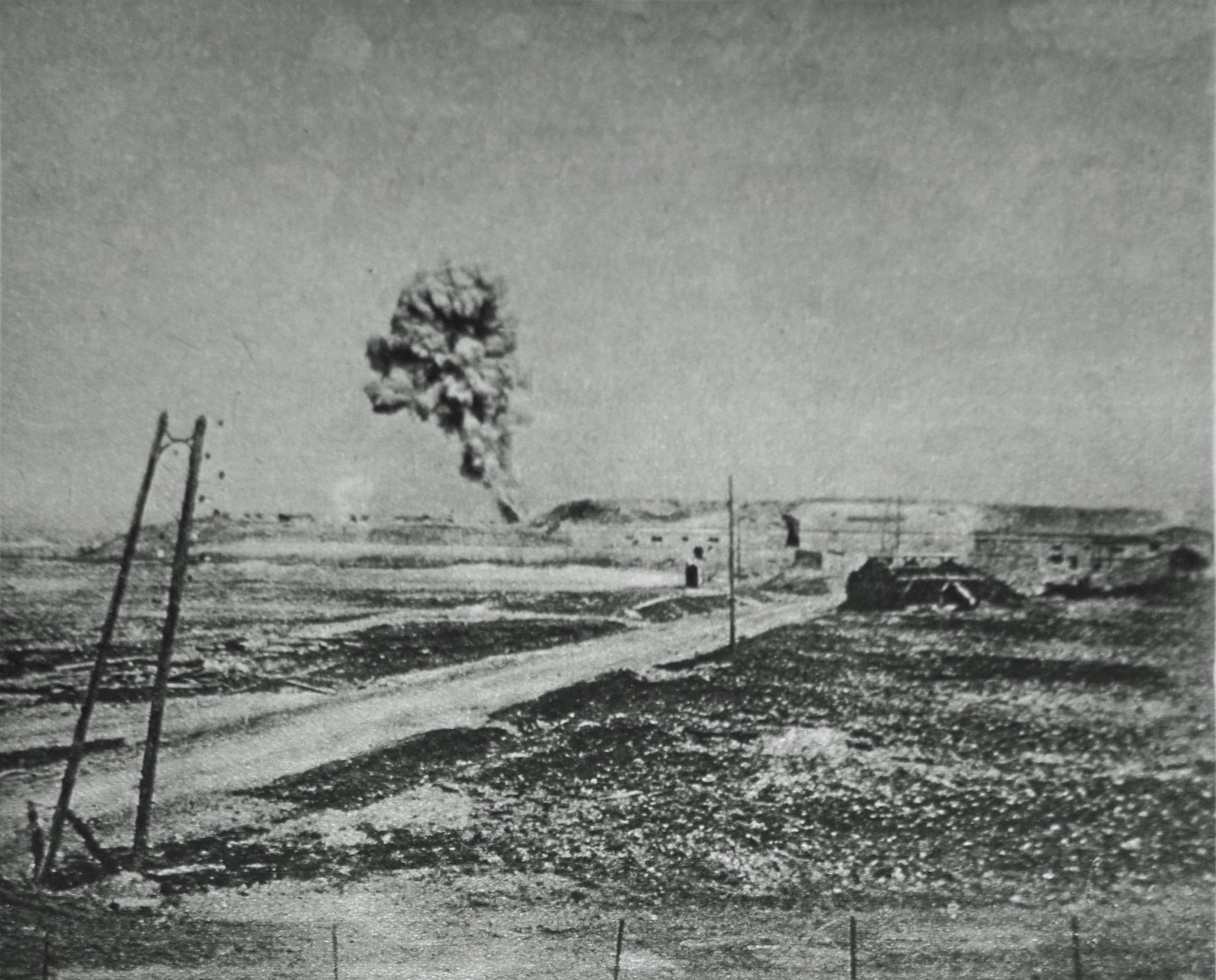 Photos prises et publiées pendant la Première Guerre mondiale du Fort de Vaux.